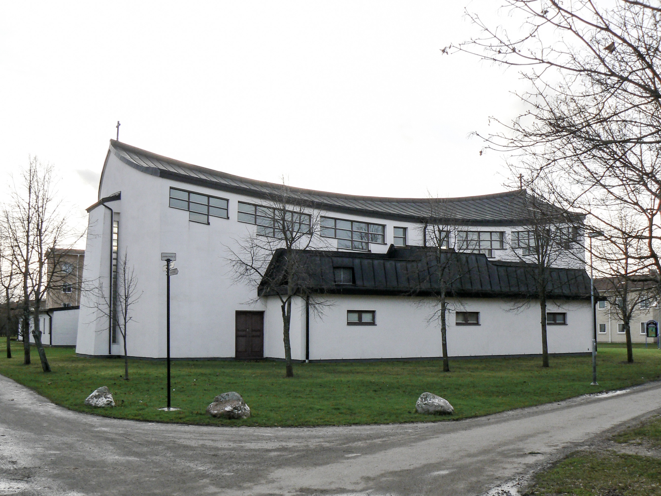 Lambohovskyrkan i Linköping. Lambohov's church in Linköping, Sweden. Architect Guy Sjöwall, 1986. Photo by Skvattram 2006-12-08.